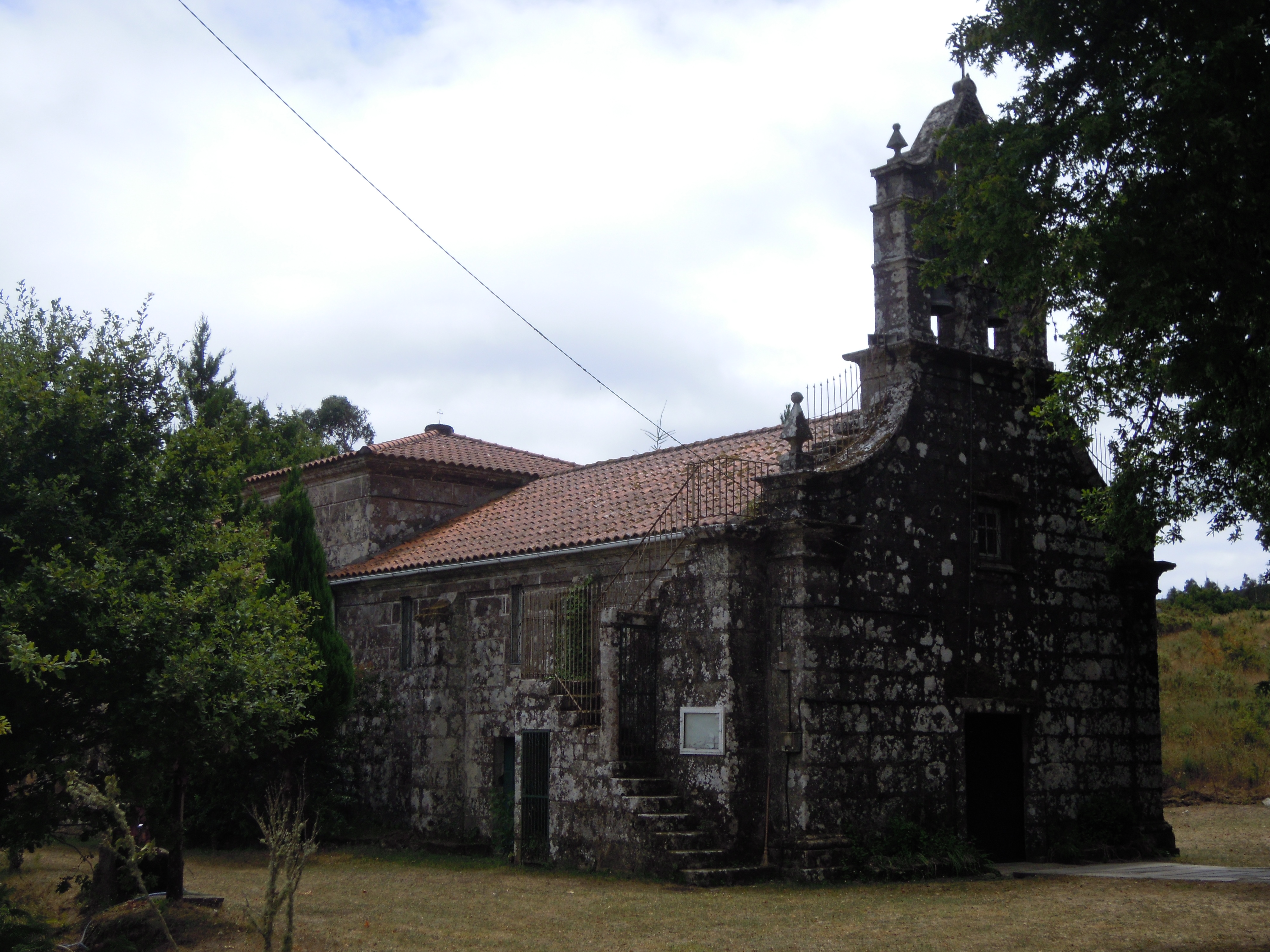 Igrexa parroquial de San Bernabeu da Ameixeira (Crecente)